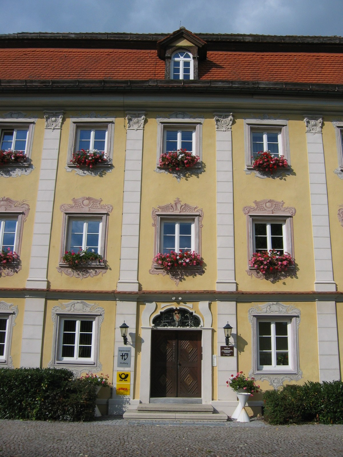 Straßberg, Zollernalbkreis: Rathaus